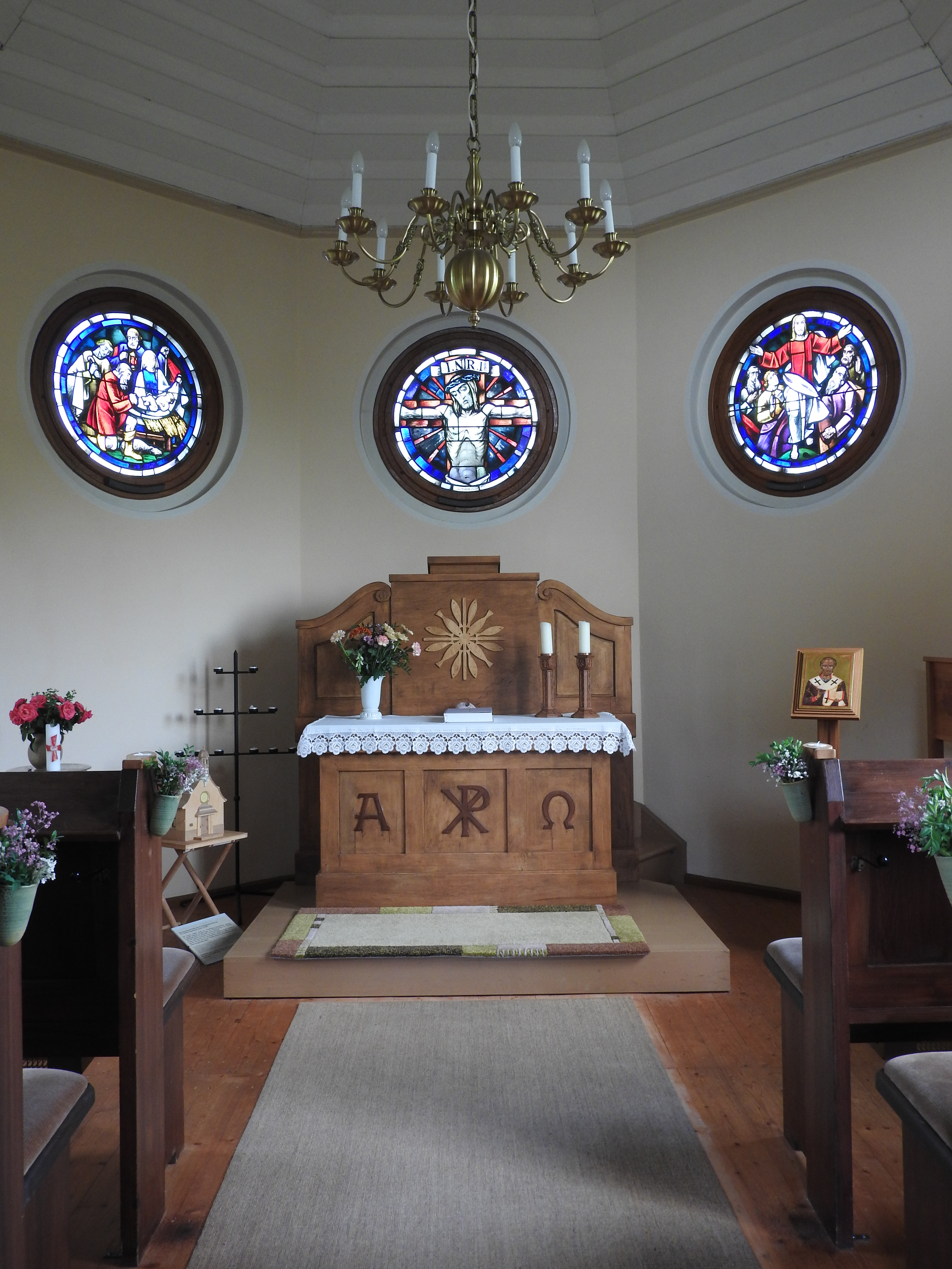 Innenraum der Nikolaus-Kapelle von Dörflas, Crispendorf in Thüringen